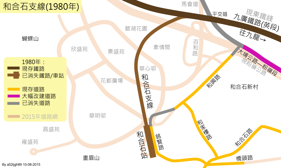 和合石支線(1980年)